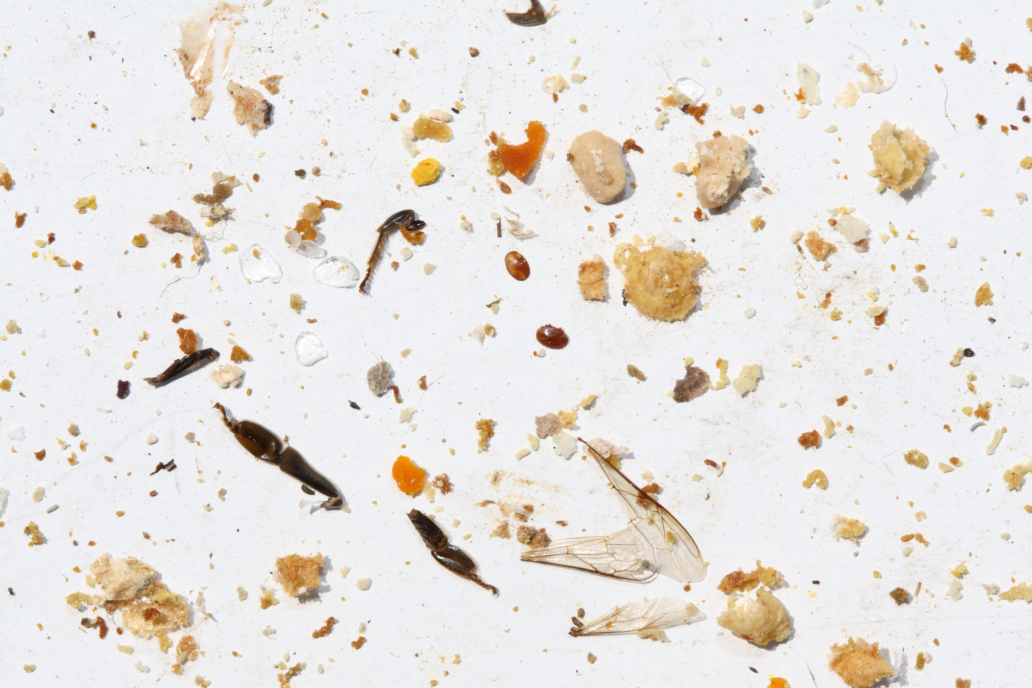 Gemülldiagnose im Bienenvolk. Gemüll nennt man alles, was unterhalb der Waben eines Bienenvolkes auf den Boden fällt. Die Untersuchung des Gemülls erlaubt Rückschlüsse auf die Gesundheit der Bienen. Hier sieht man etwas oberhalb der Mitte zwei Varroamilben (dunkelbraun glänzend und oval geformt), ferner Teile von Bienen (Flügel, Beine), Pollenpakete von verschiedenen Pflanzen (gelb, orange, grau), drei von den Bienen frisch ausgeschwitzte Wachsplättchen (die anfangs weiß und fast durchsichtig sind), einen hellbraunen runden Deckel einer Drohnenzelle, der beim Schlüpfen des Drohns abgenagt wurde, und viele kleinere Teilchen aus Wachs oder Pollen.